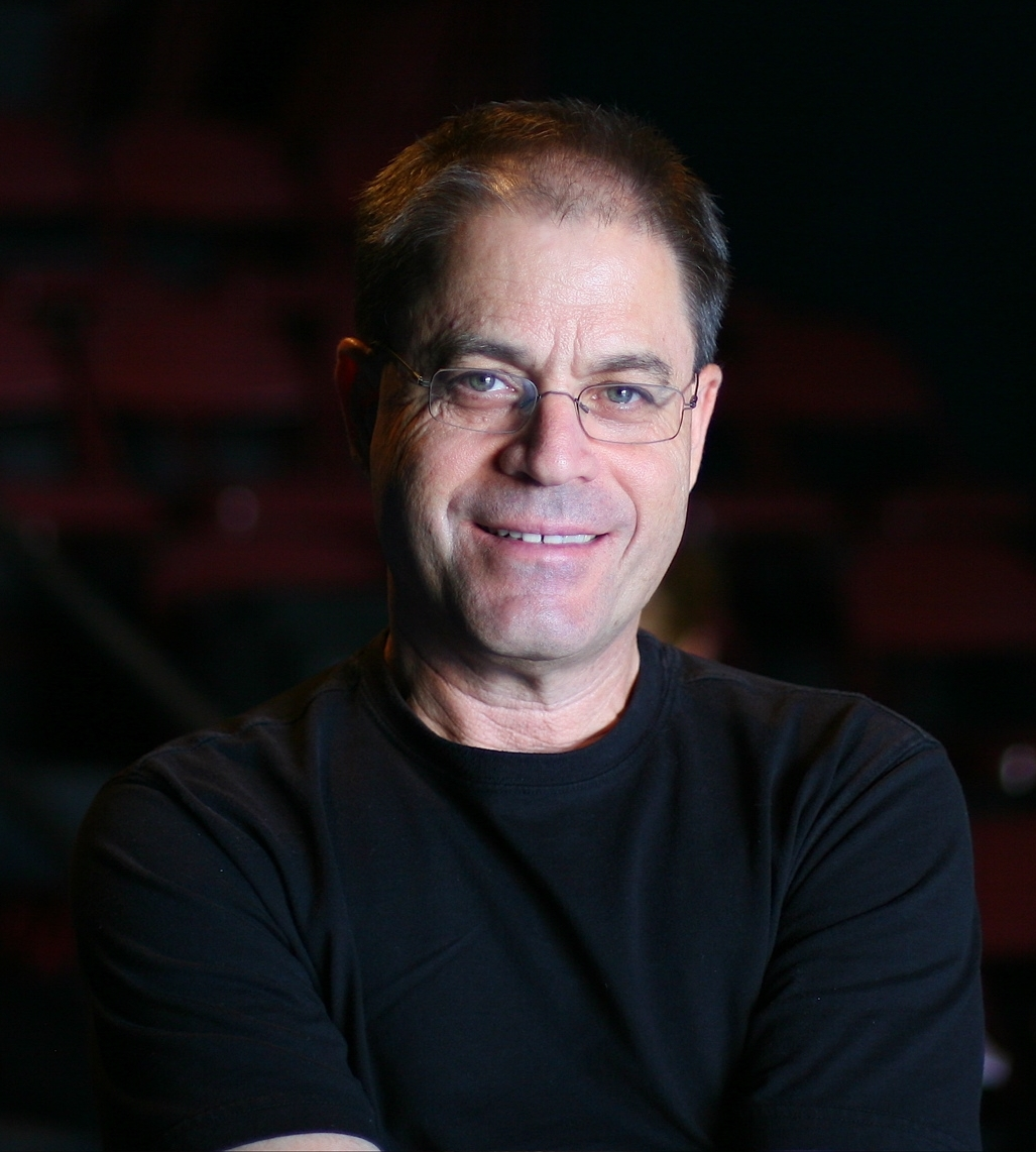 Motti Lerner's portrait